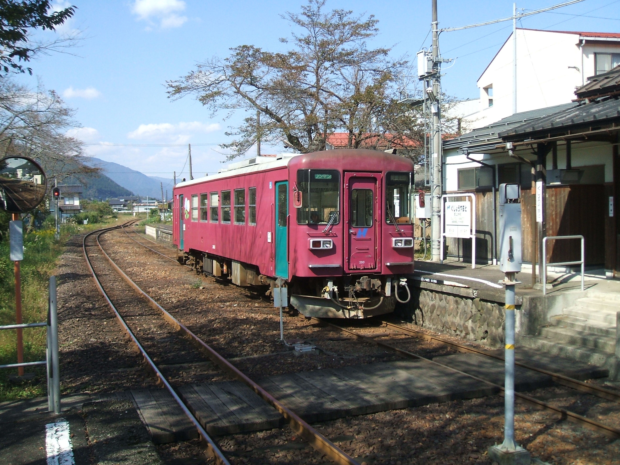 停車中の列車